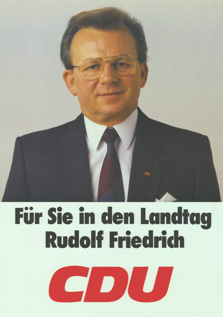 Für Sie in den Landtag Rudolf Friedrich CDUAbbildung:PorträtfotoKommentar:Rückseitig mit Kugelschreiber beschriftet.Plakatart:Kandidaten-/Personenplakat mit PorträtObjekt-Signatur:10-007 : 708Bestand:Landtagswahlplakate Hessen (10-007)GliederungBestand10-18:Landtagswahlplakate Hessen (10-007) » CDULizenz:KAS/ACDP 10-007 : 708 CC-BY-SA 3.0 DE